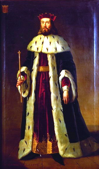 Retrato imaginario del rey Alfonso II de Aragón (1154-1196), que fue hijo del conde Ramón Berenguer IV de Barcelona y de la reina Petronila de Aragón.